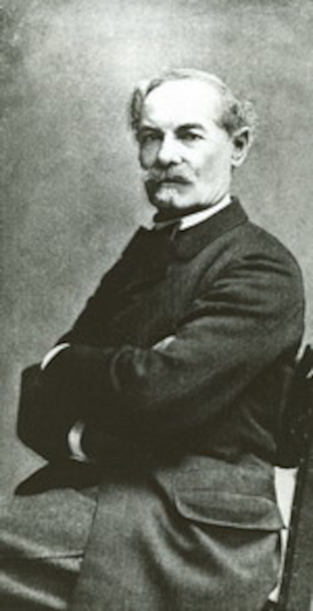 Leveldi Kozma Ferenc Albert (Sőrnye puszta, Somogy vármegye, 1826. szeptember 19. – Mezőhegyes, Békés vármegye, 1892. július 6.) földművelésügyi miniszteri titkár, majd tanácsos, aki sokat tett Mezőhegyes gazdálkodásának, ezen belül lótenyésztésének fellendítéséért.